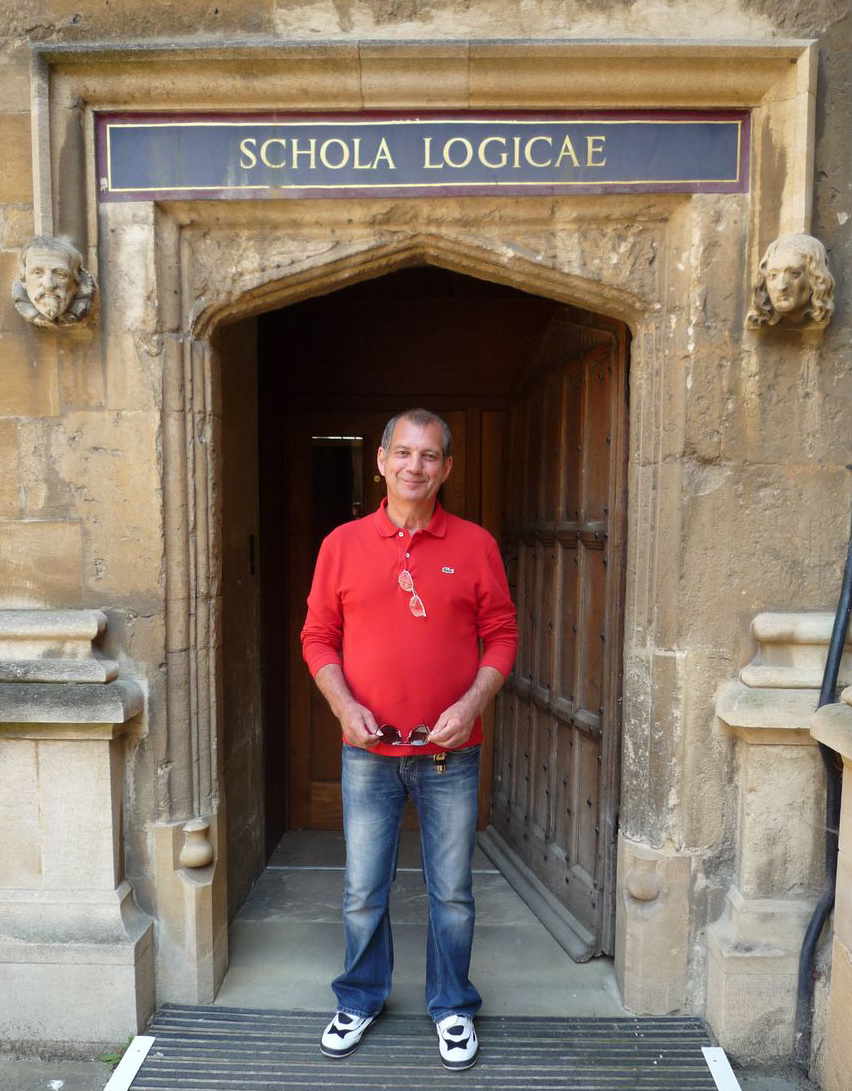 Jacky Dreksler, Juni 2013. Innenhof der Bodleian Library, Oxford